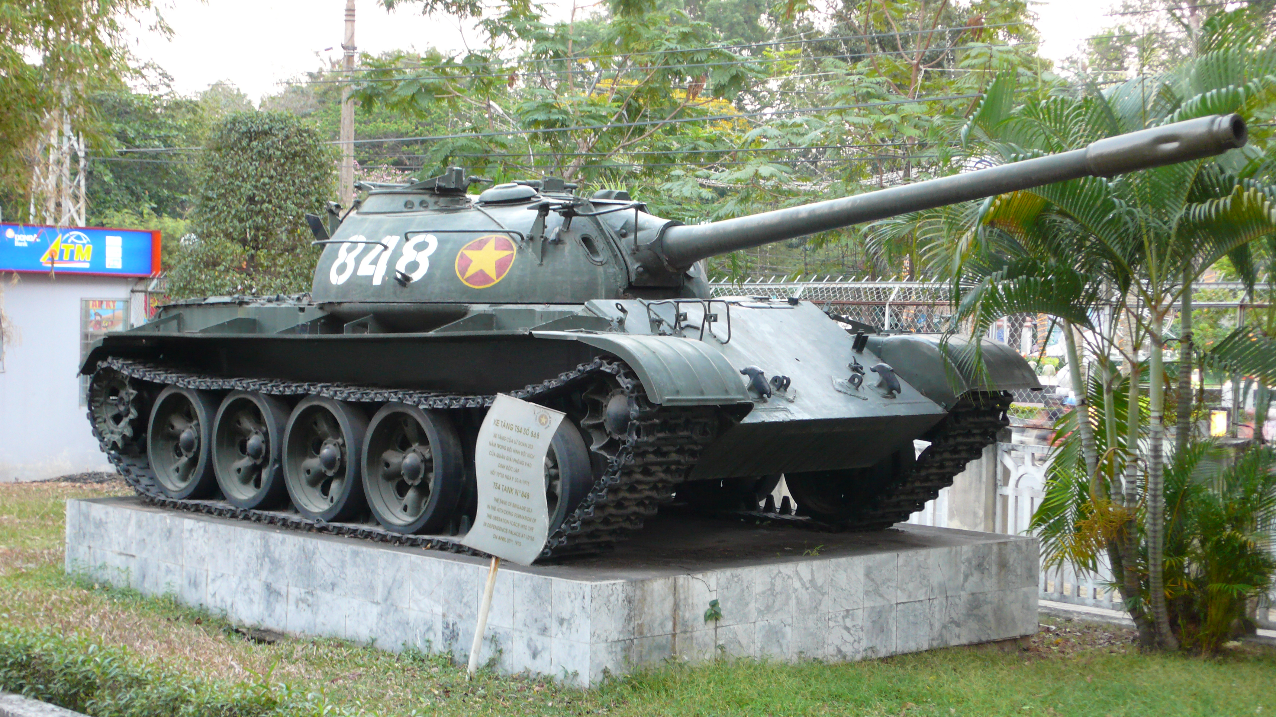 Vietnamese T-54A (#848).